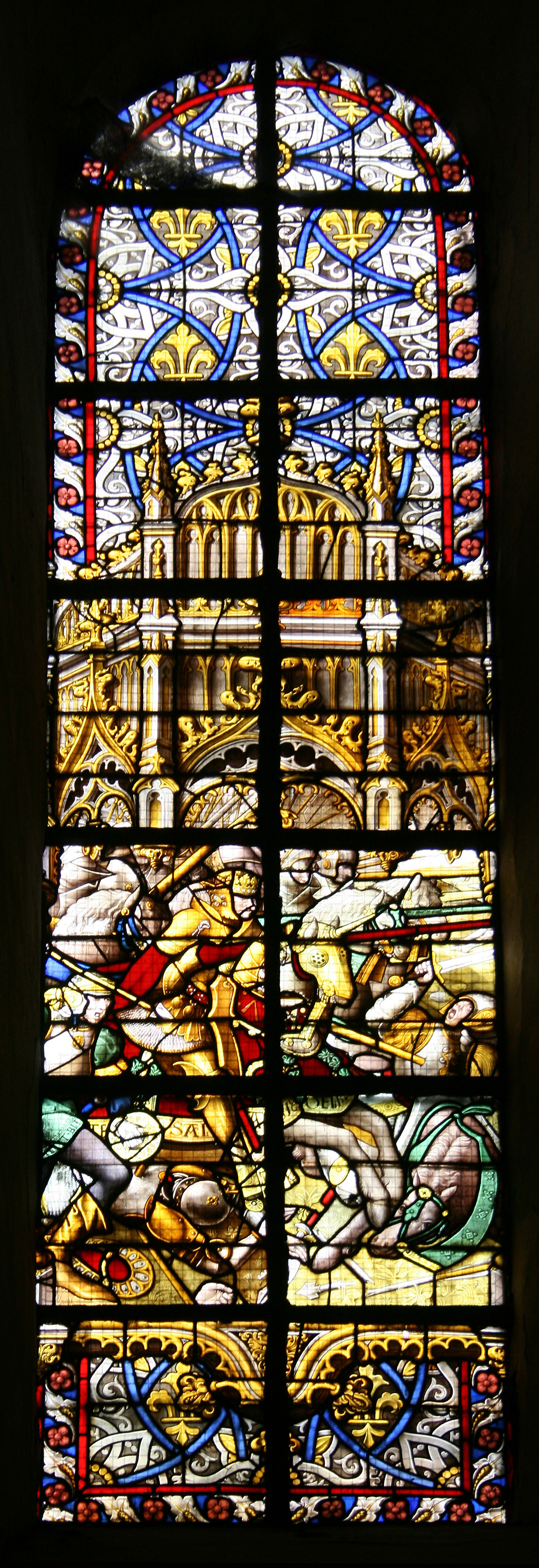 Vitrail (XVIe siècle) du transep sud de la cathédrale Nodre-Dame de Tournai (Belgique) .